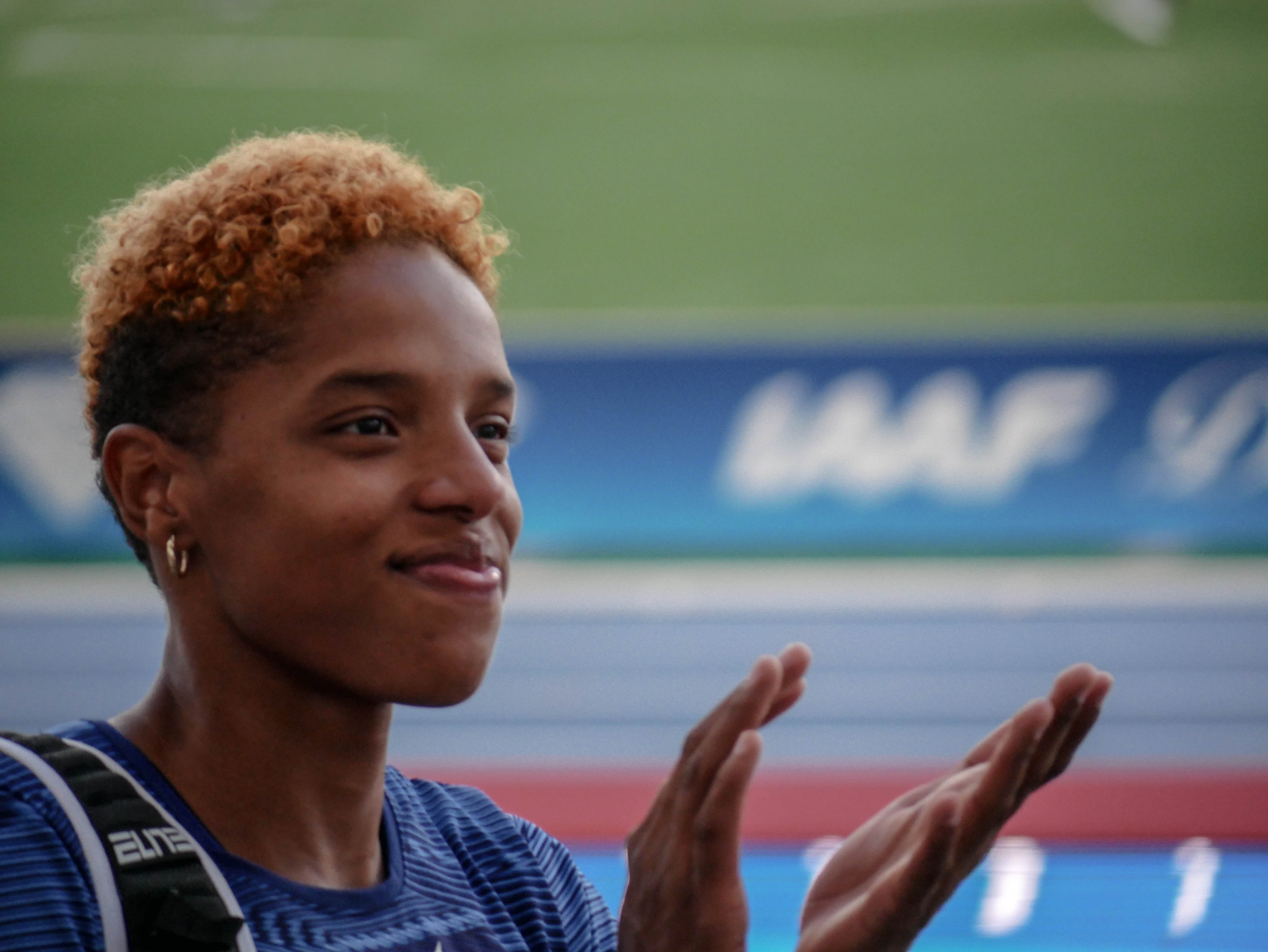 Meeting de Paris 2019 - Compétition d'athlétisme au stade Charlety - 24 août 2019